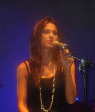 Autore: Antonello De Marco (Antonello 92)